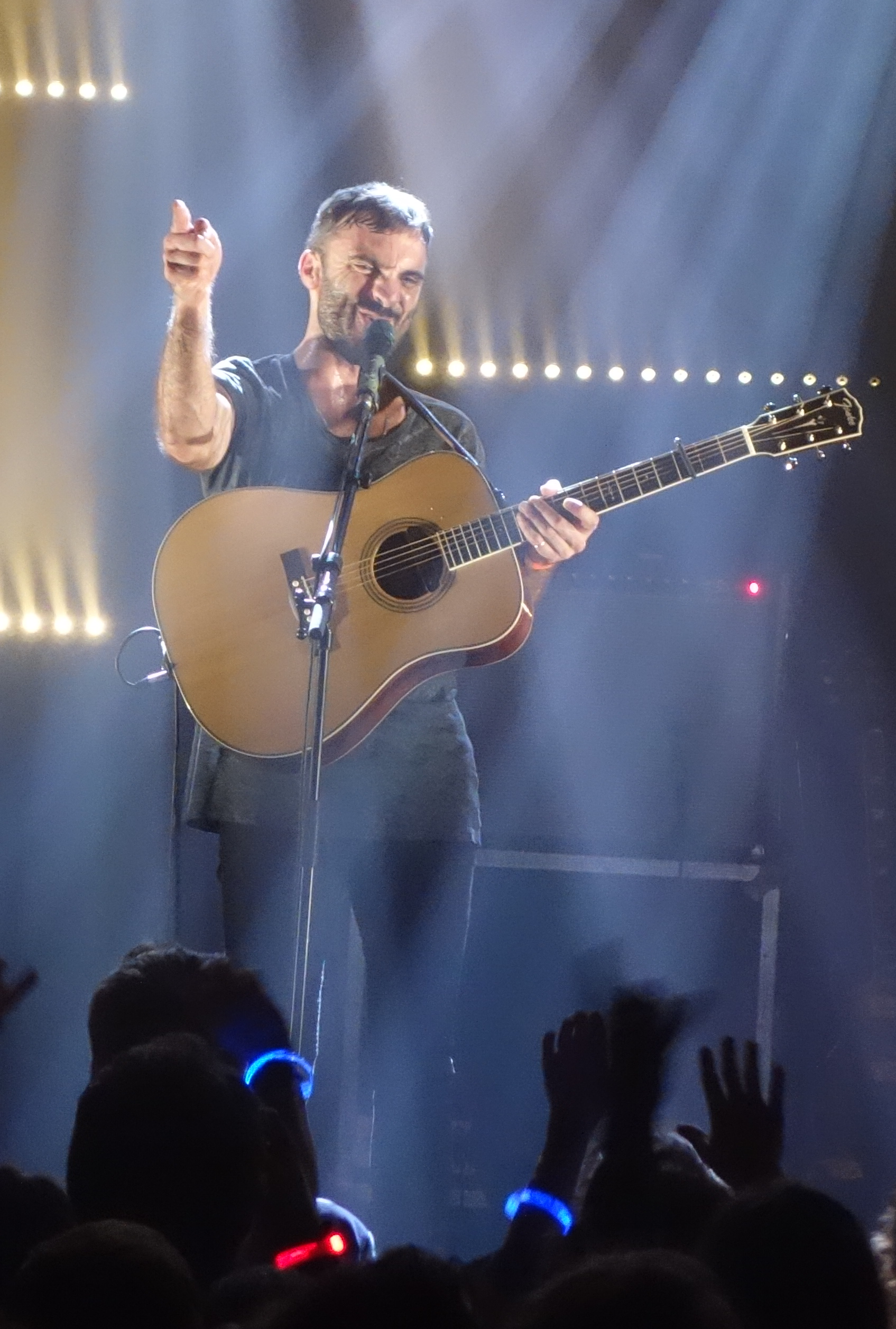 Talisco au Moulin de Brainans